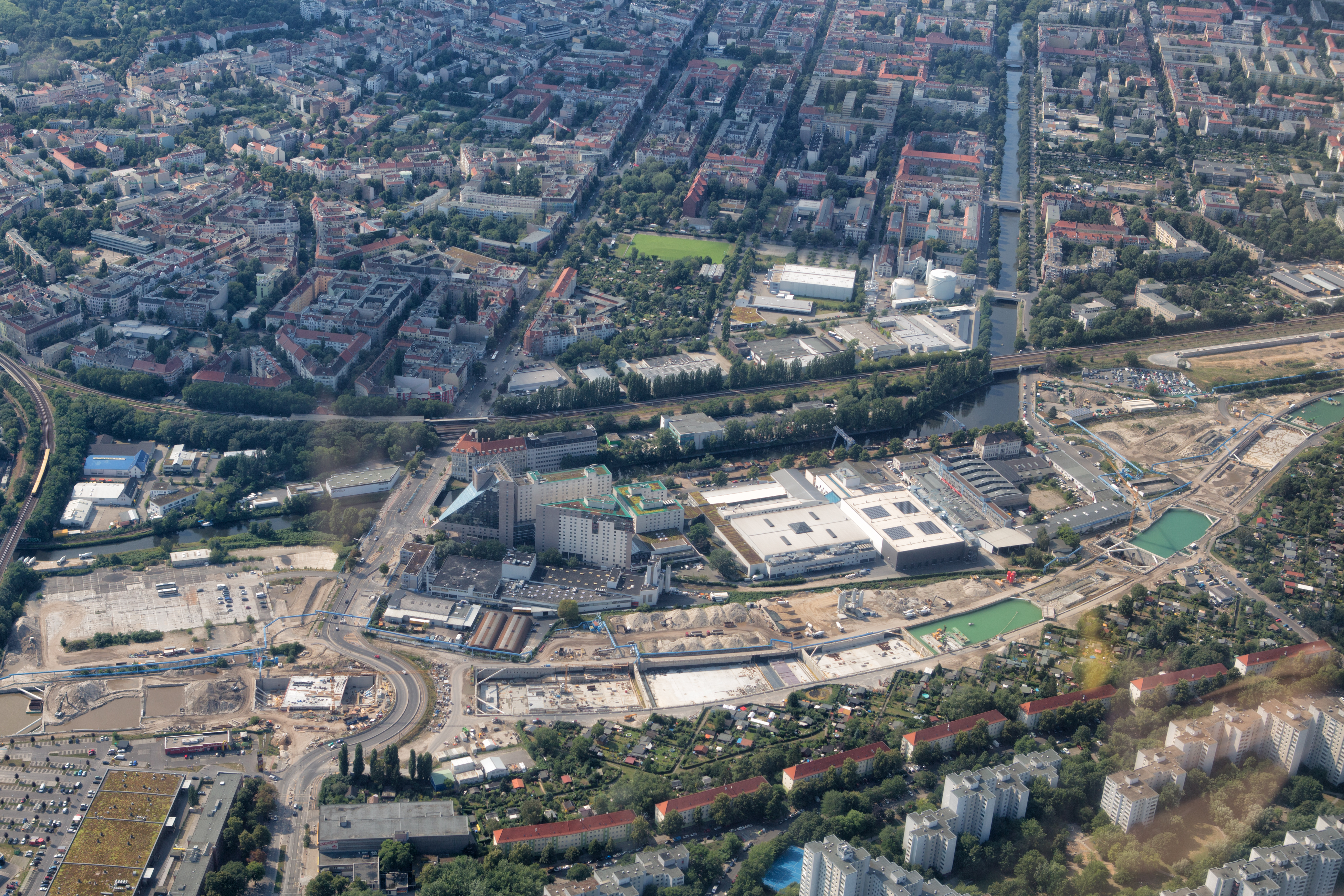 2016. Estrel Hotel und im Bau befindliche Verlängerung der A100.